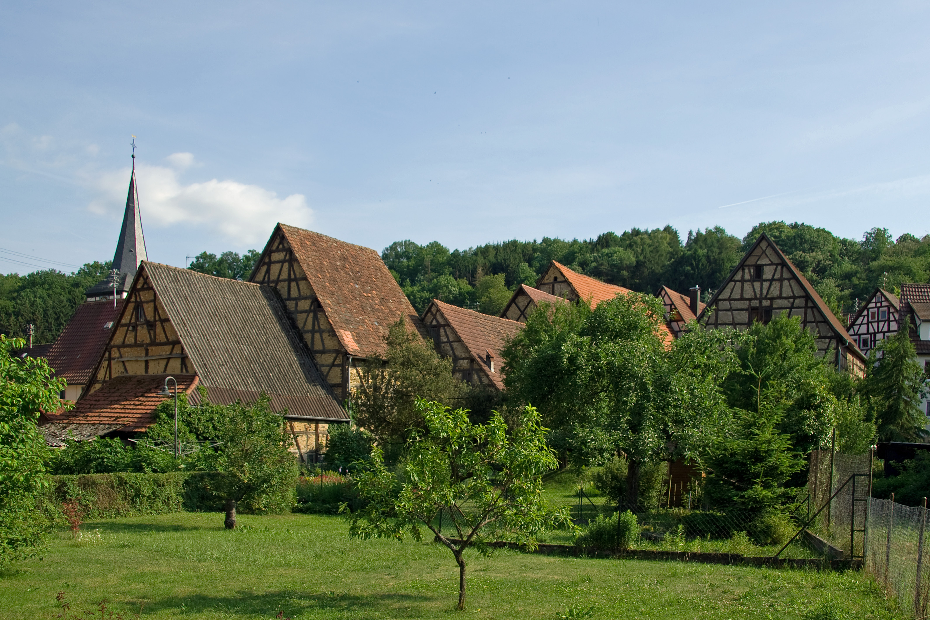 Blick von der Auricher Kreuzbachstraße zur Ortsmitte